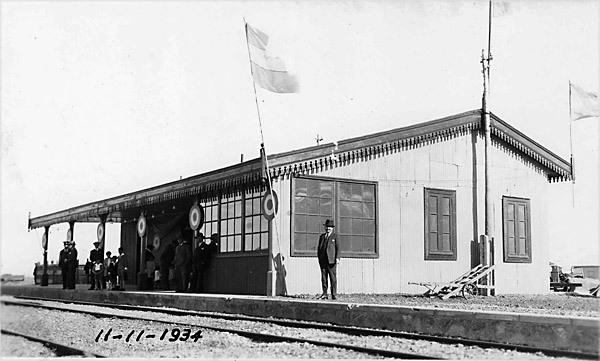 La estación Las Heras en noviembre de 1934